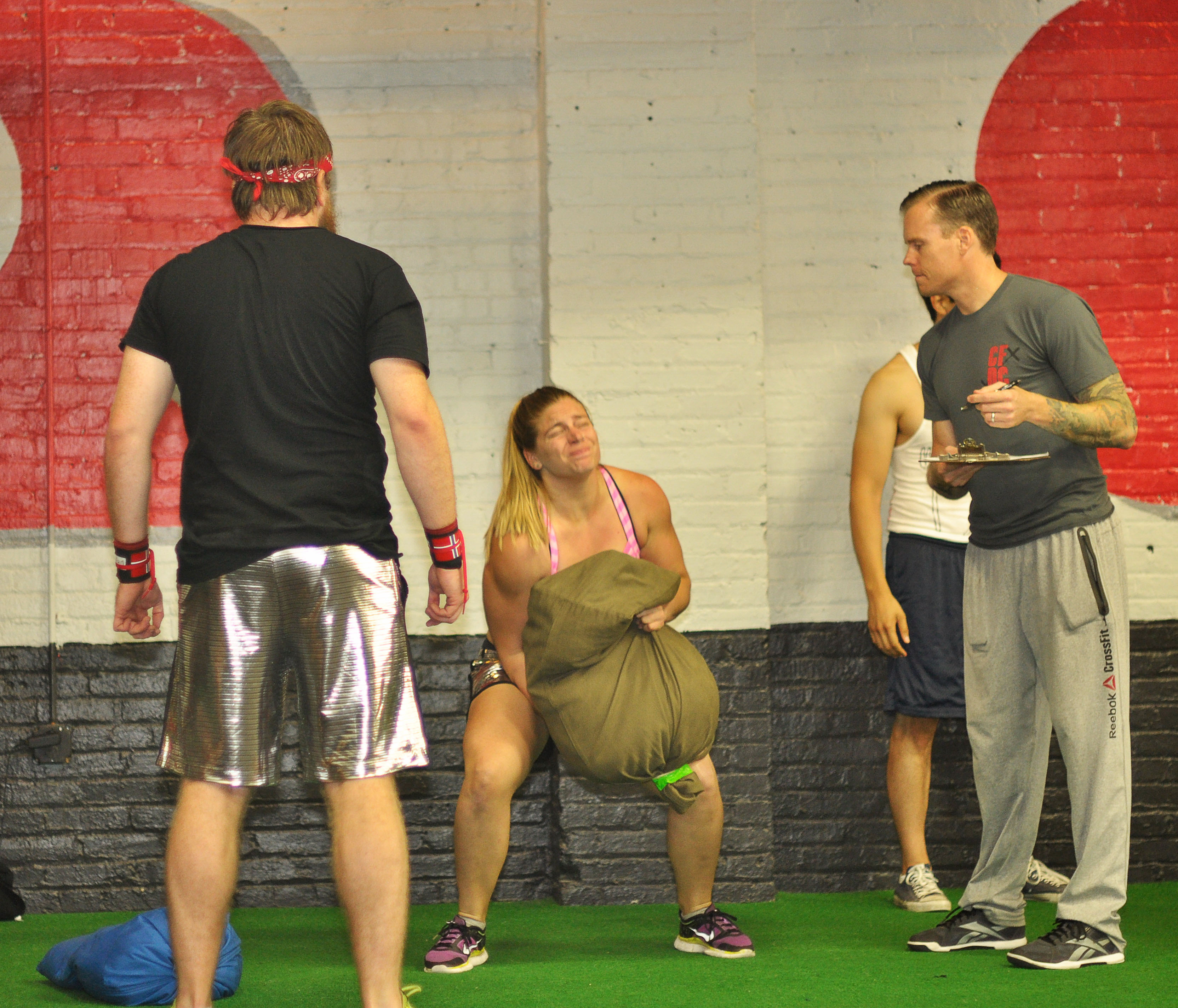 crossfit dc -_-402